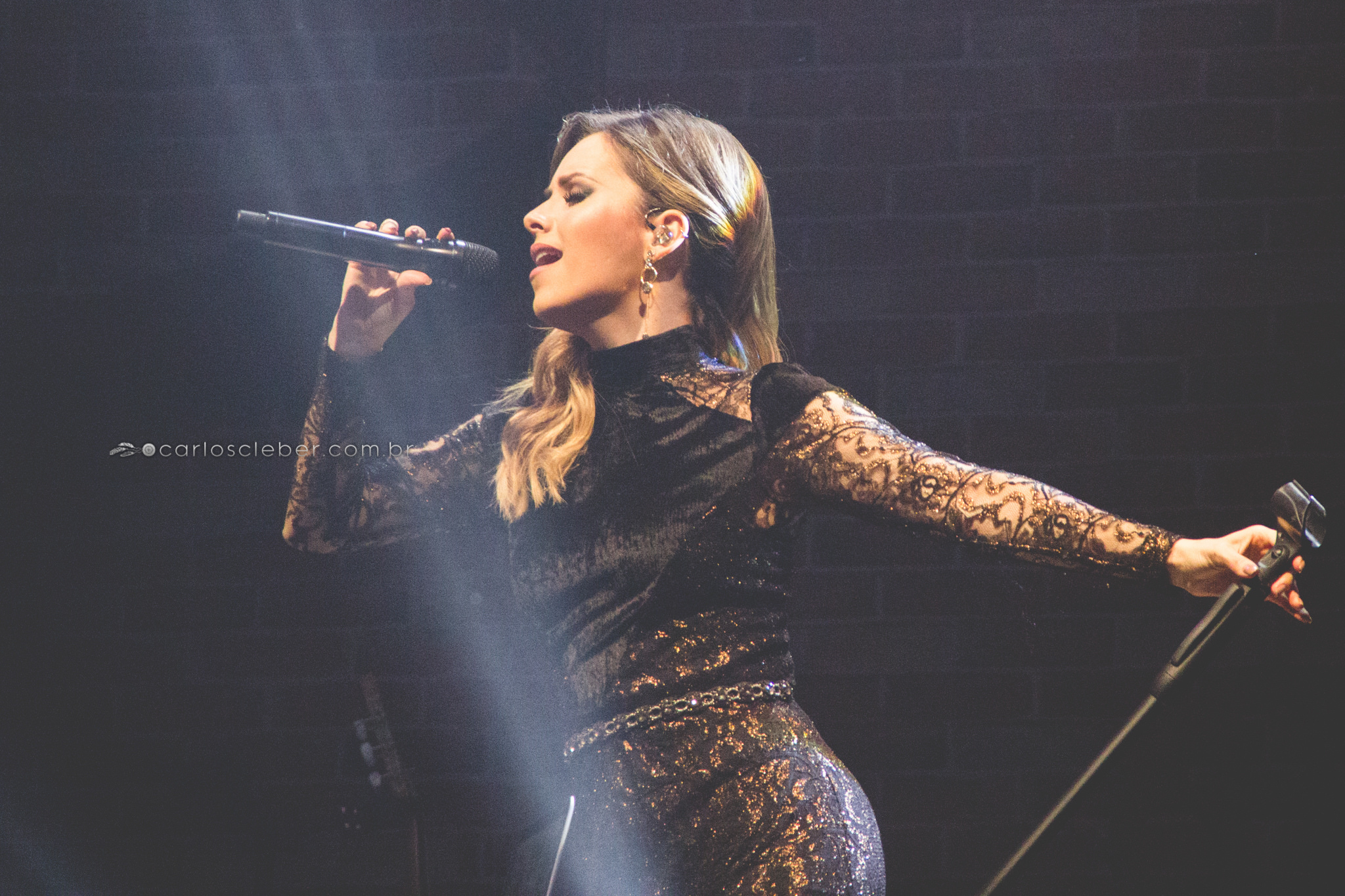 Sandy na turnê Meu Canto.